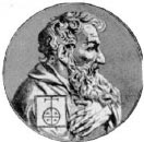 Agop Meghapart, Акоп Мегапарт - армянский первопечатник